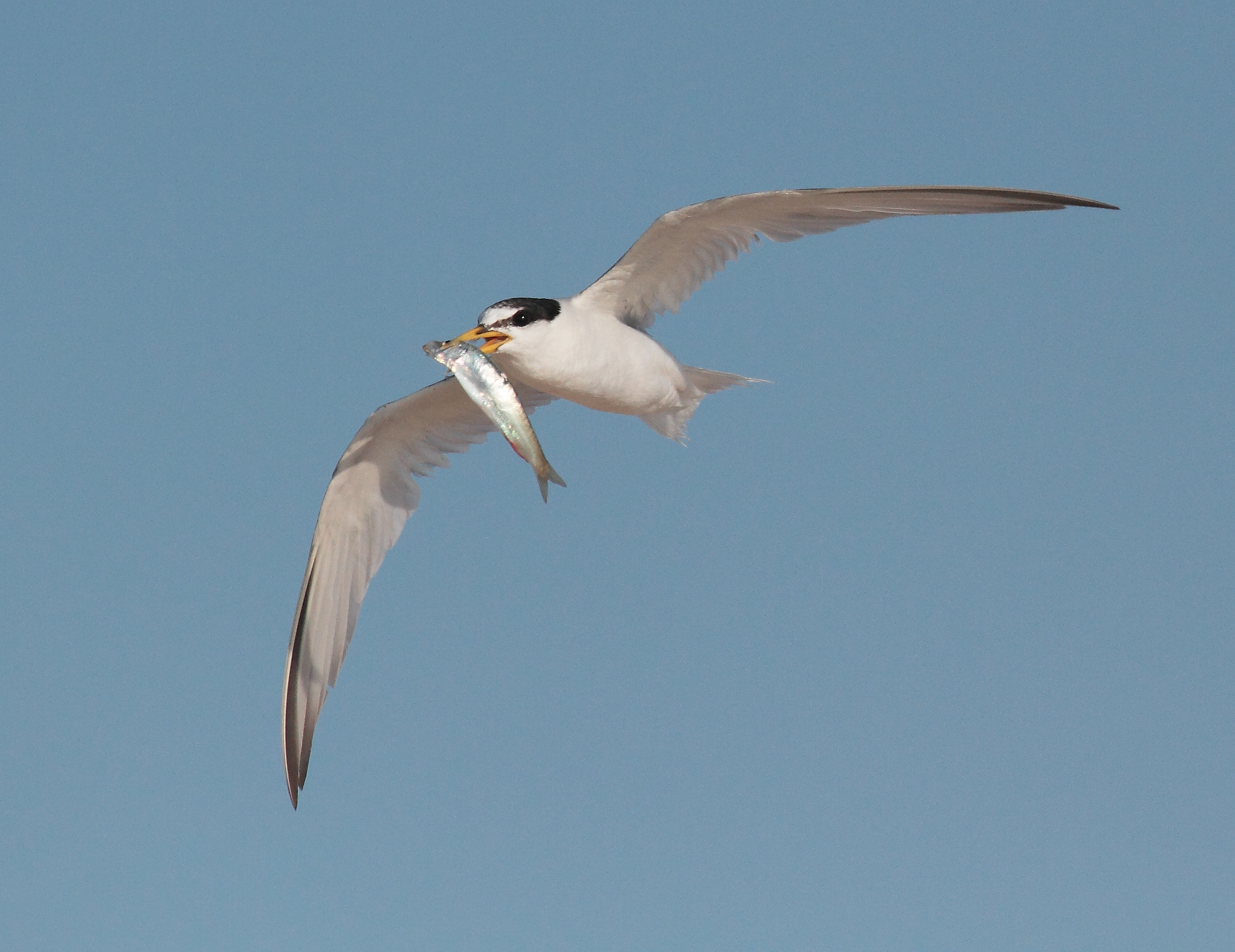 Charrancito Sternula albifrons, El Puerto de Santa María, Andalusia, España.